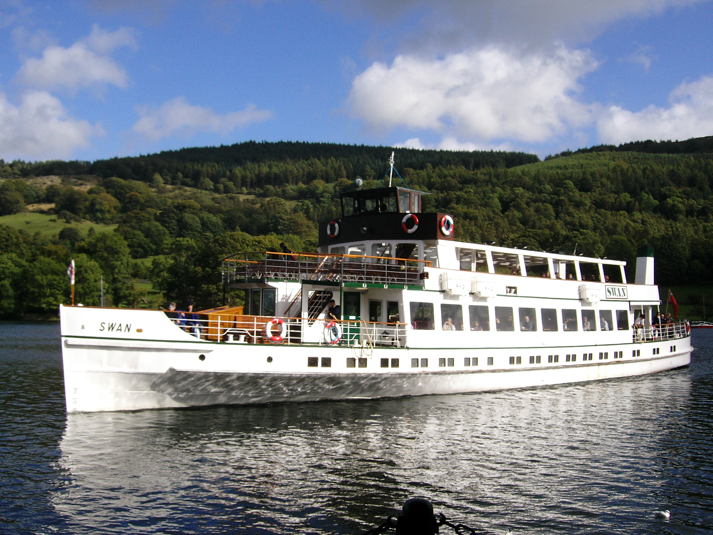 MV Swan on Lake Windermere